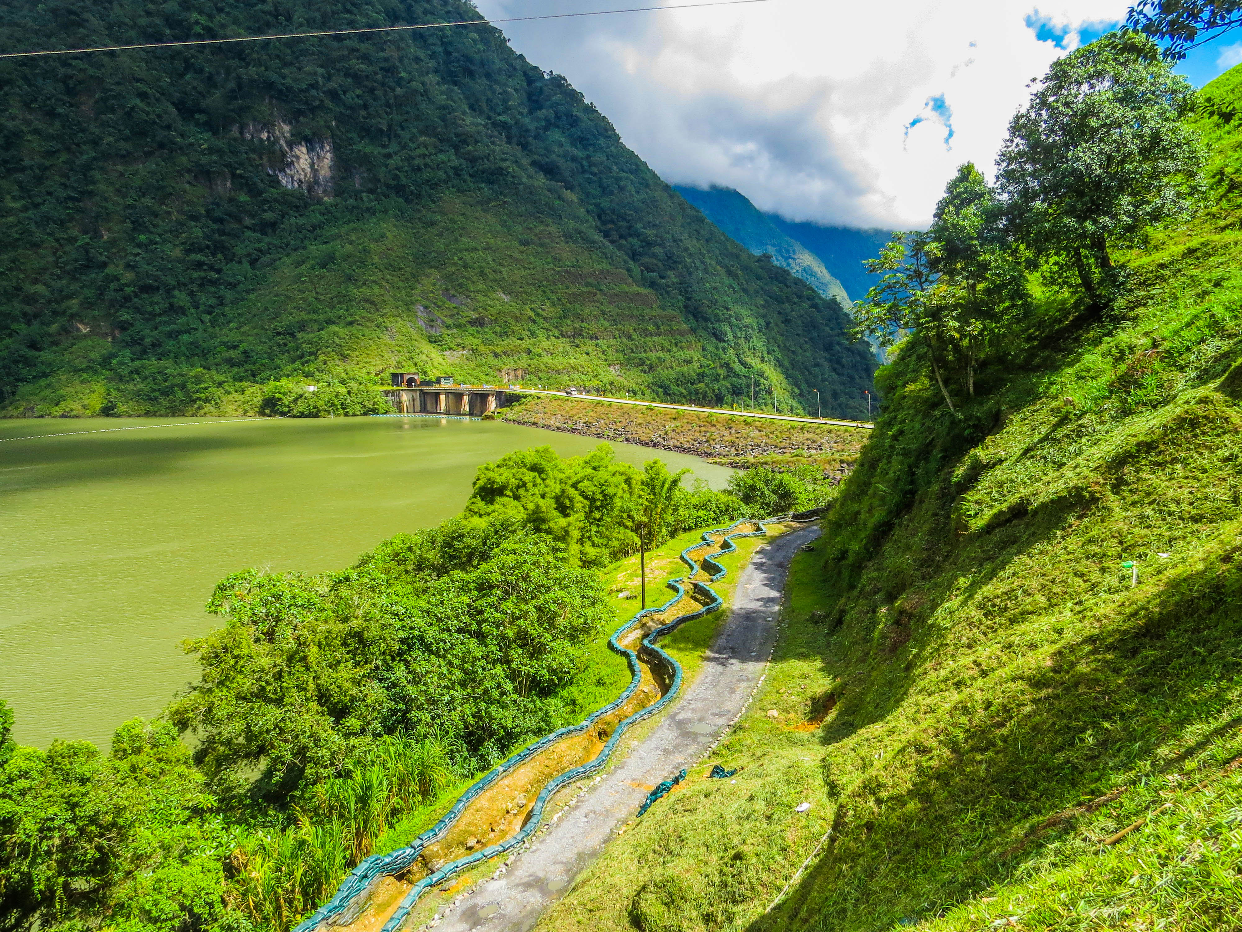 Es un lago artificial creado para proporcionar potencial hidráulico a la Central Hidroeléctrica de Chivor, ubicado en jurisdicción de los municipios de Macanal, Chivor y Almeida, en el departamento de Boyacá en la República de Colombia. Monumento de la ingeniería colombiana.